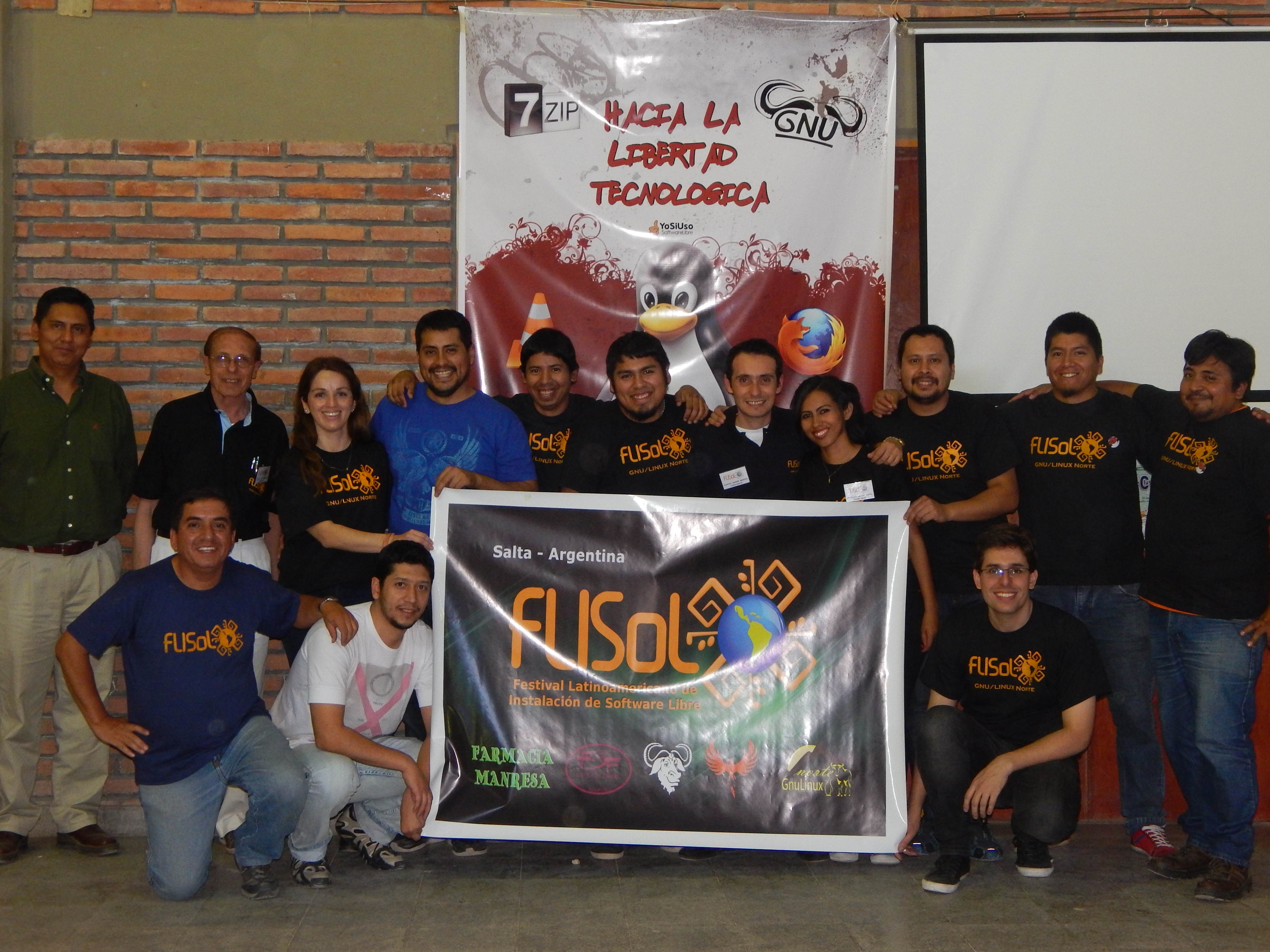 FLISoL - Grupo GNU/Linux Norte